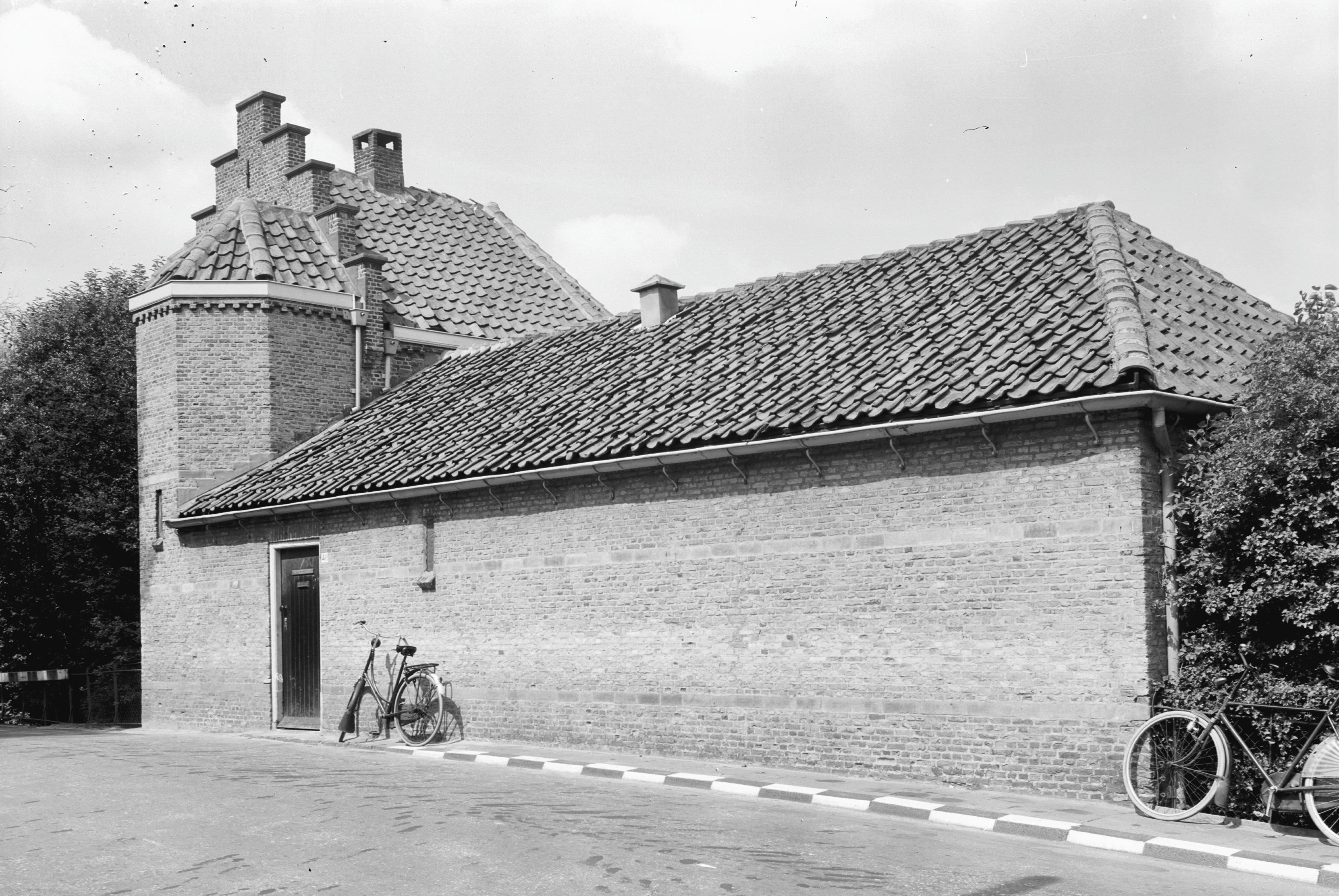 Wallen en Torens: Huibrechtstoren Oostplantsoen 40, gevel